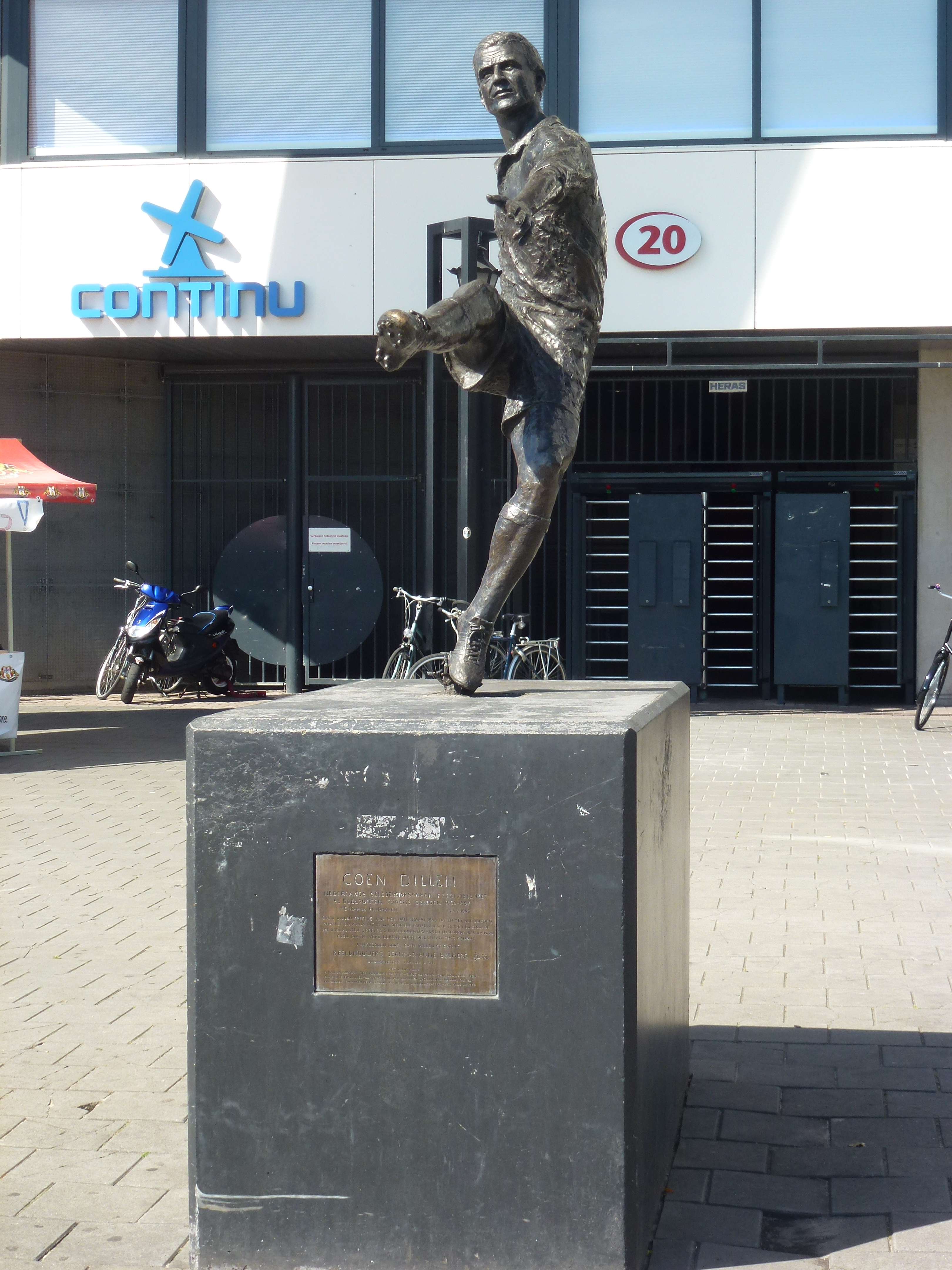 Coen Dillen, Jean en Marianne Bremers - PSV Stadion Eindhoven